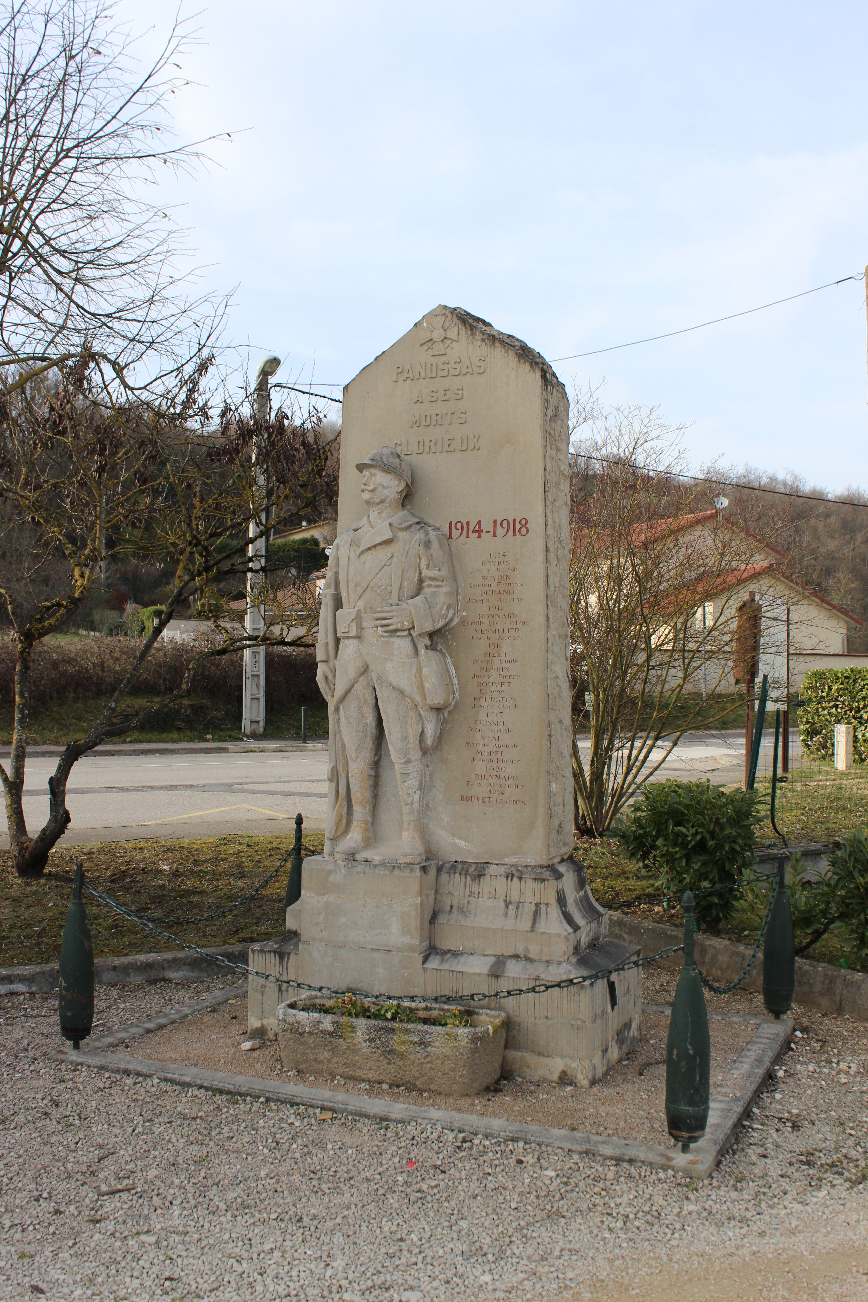 Monument aux morts 1914-1918 de Panossas.